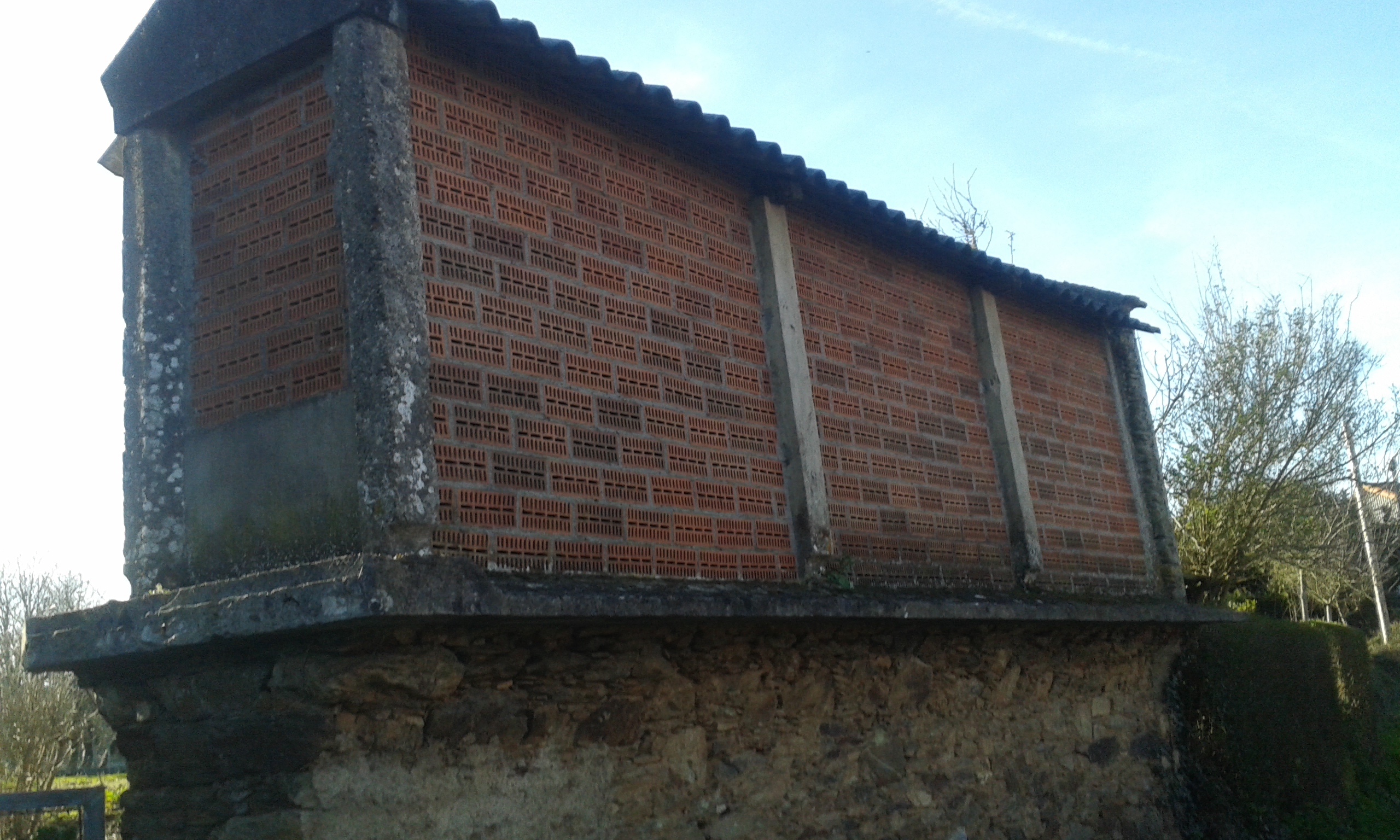 Hórreo situado no Valado